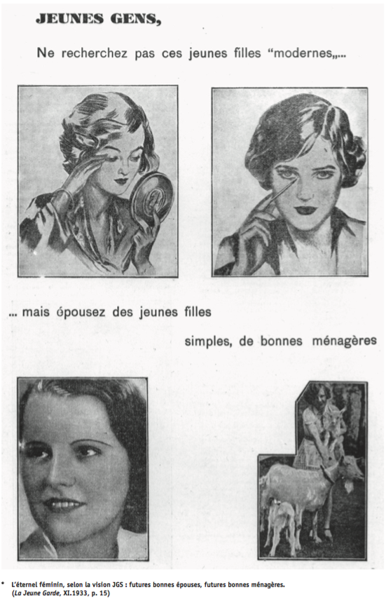 Prospectus des Jeunes Gardes Socialistes